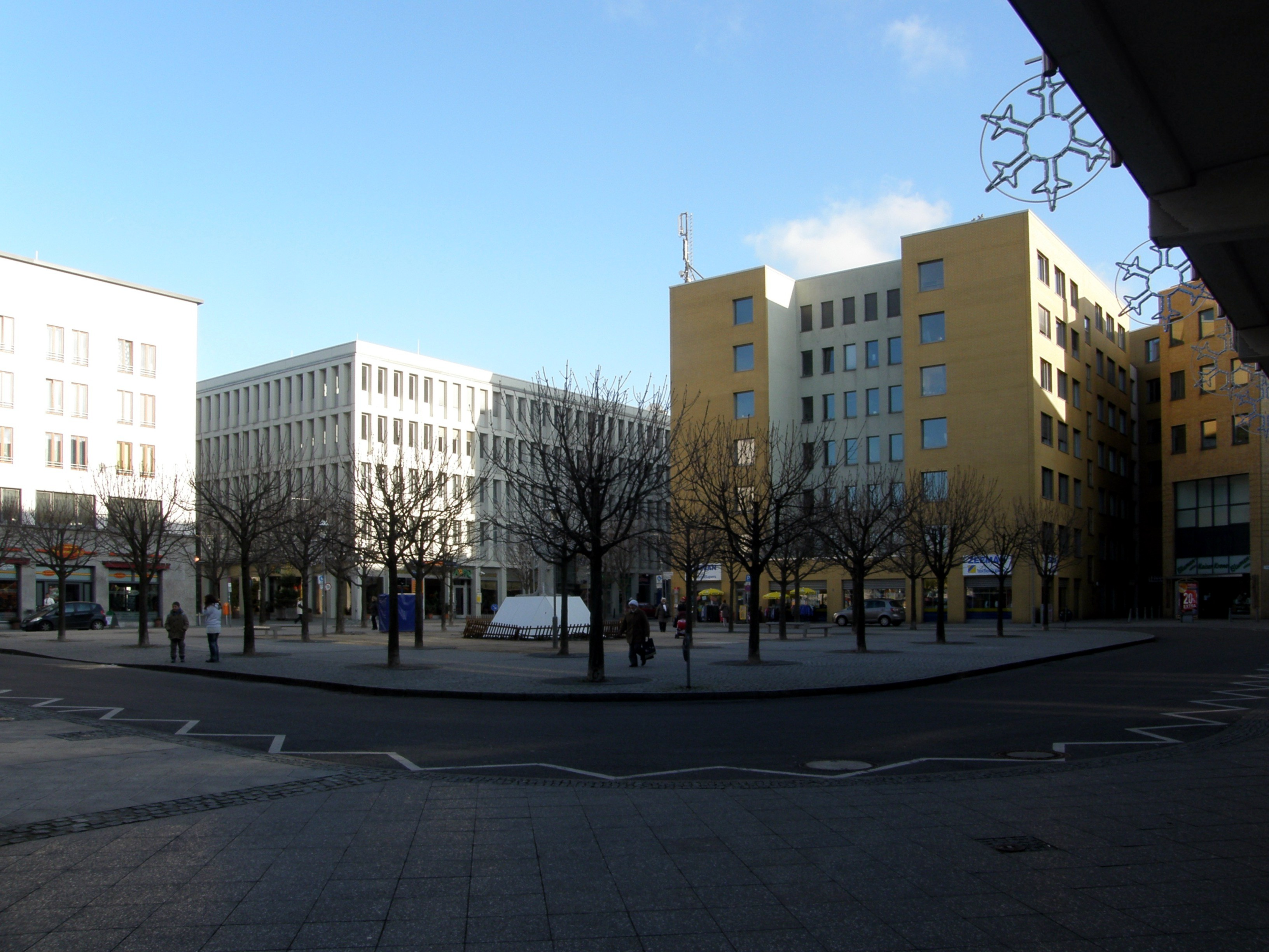 Berlin-Hellersdorf, Fritz-Lang-Platz